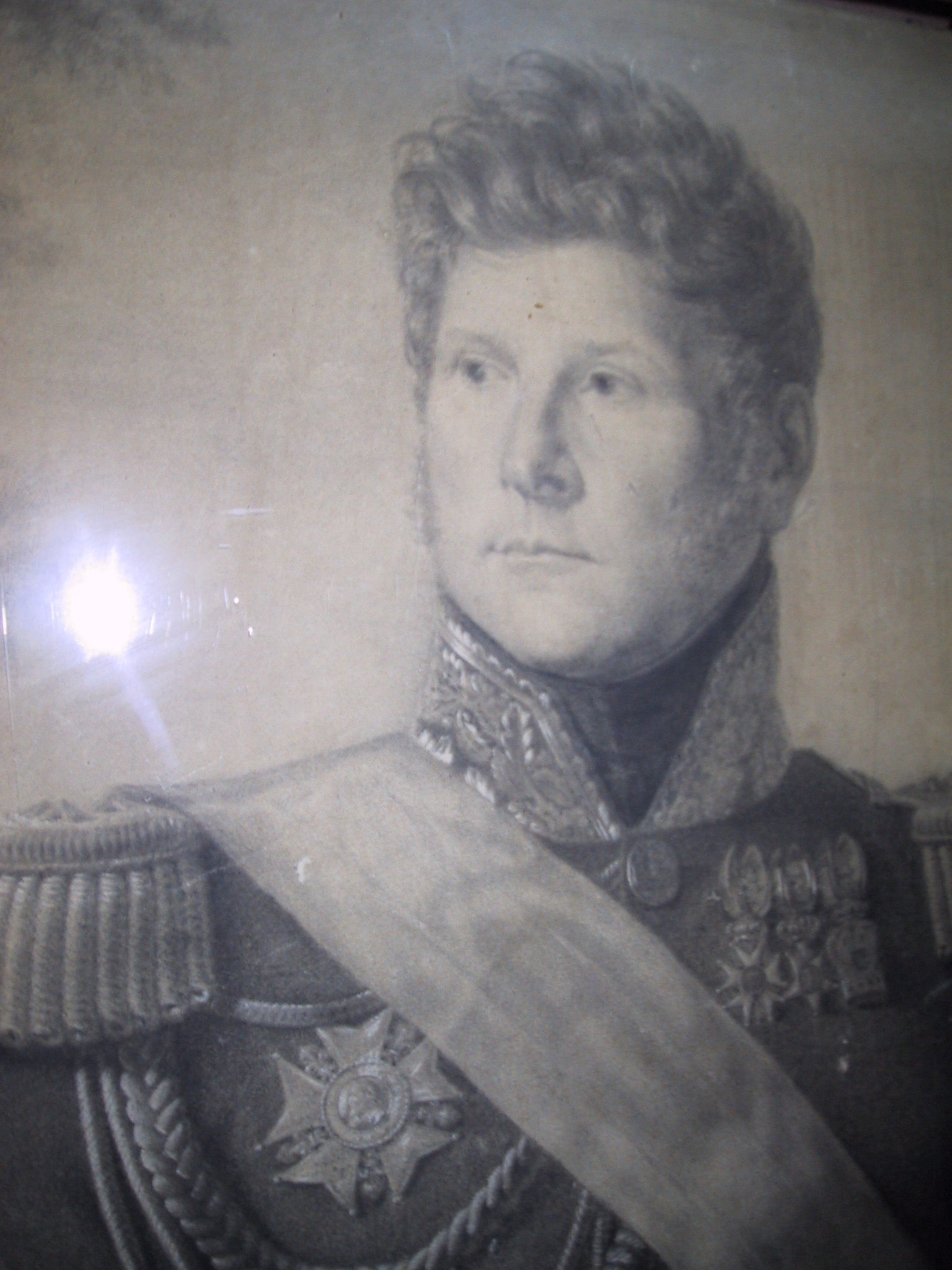 Photo d'un fusain représentant le général Mermet